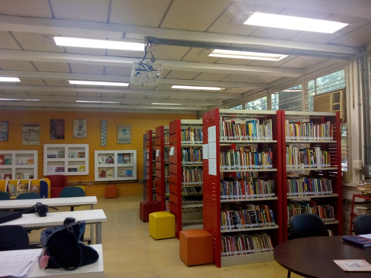 Laboratório do livro, leitura, literatura e biblioteca da UFG, LIBRIS. Na imagem mobiliário da biblioteca modelo, estantes coloridas, acervo organizado, puffs coloridos, mesas de estudo, cadeiras. Ao fundo decoração com quadros e prateleiras com livros infantis.